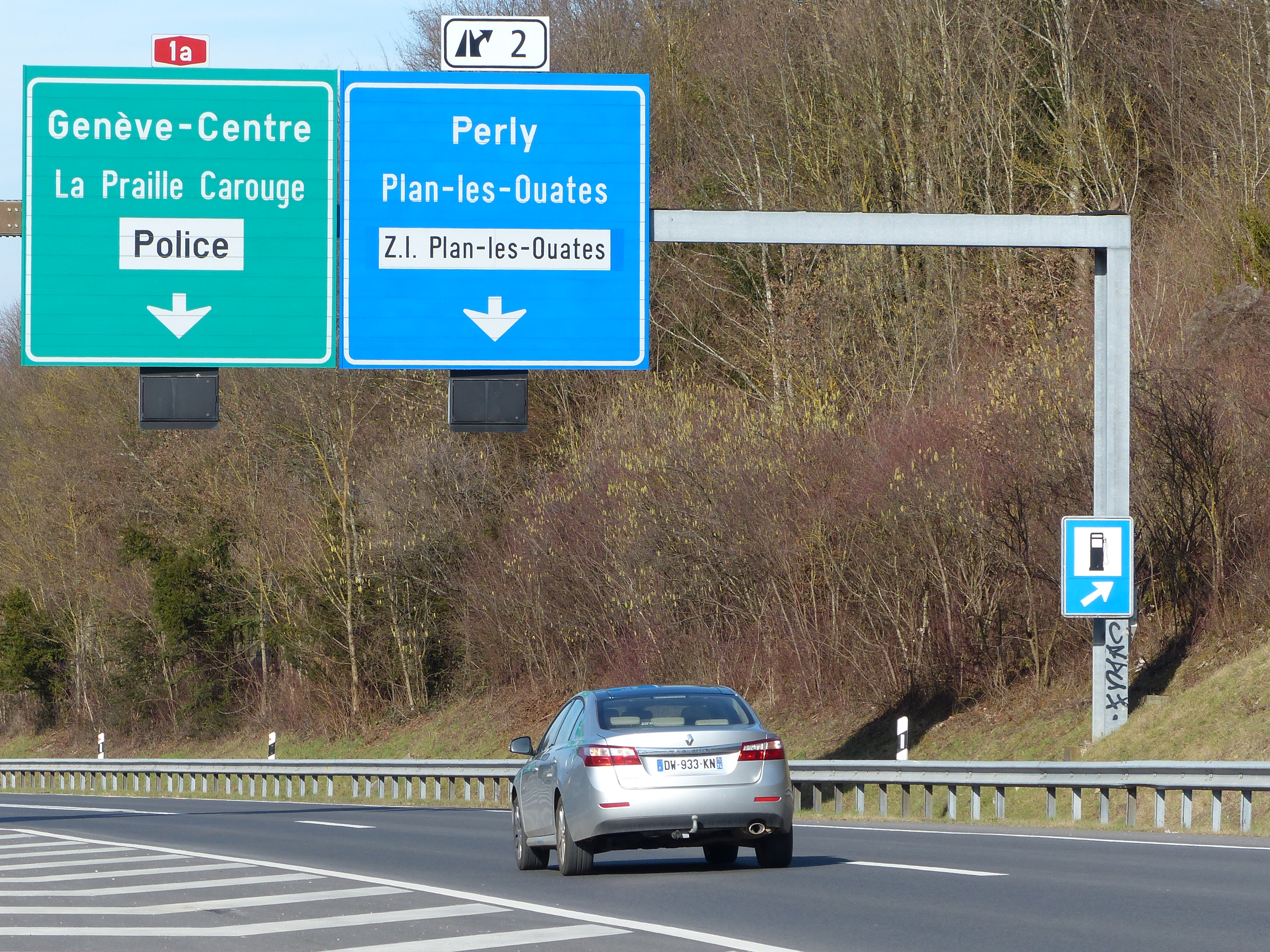 Sortie 2 et embranchement A1a en direction de Carouge, autoroute suisse A1, Plan-les-Ouates, canton de Genève, Suisse.